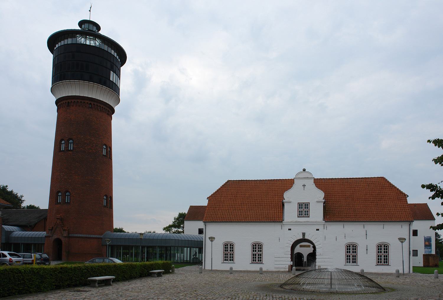 Tønder: Museum und ehemaliger Wasserturm (zum Museum gehörig, Ausstellung für Stuhl-Design Hans J. Wegner)